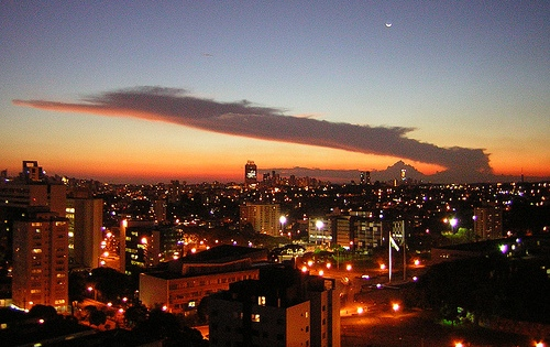 Vista de Curitiba/Brasil.